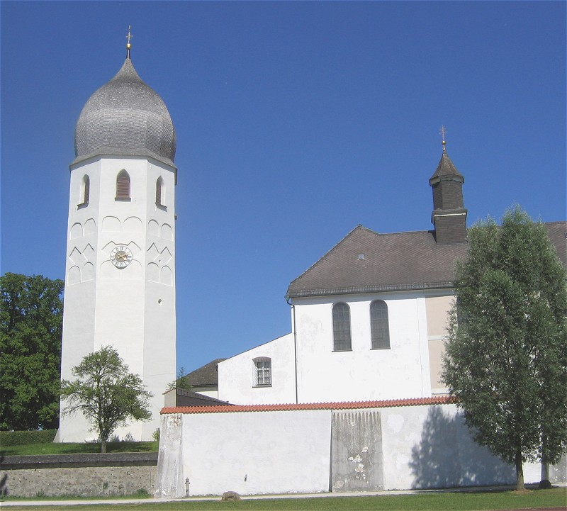 Glockenturm auf Frauenchiemsee